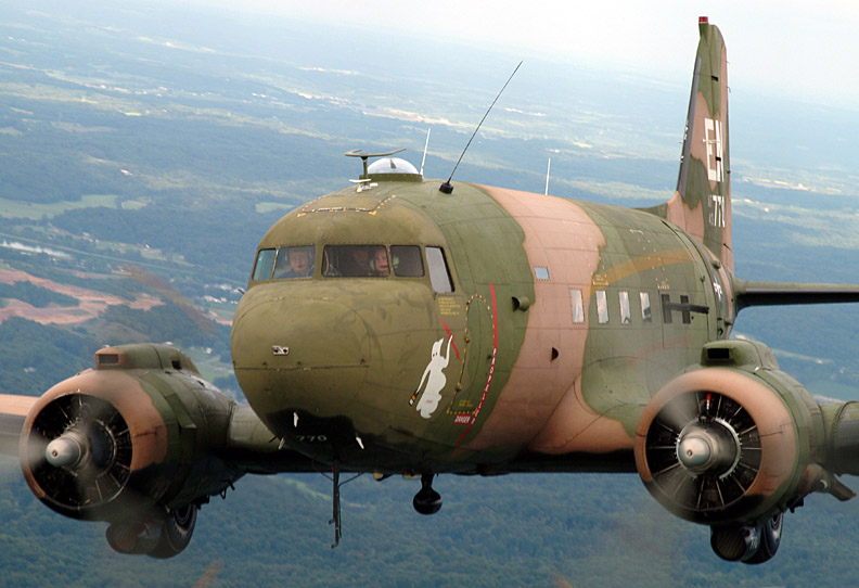 ac-47